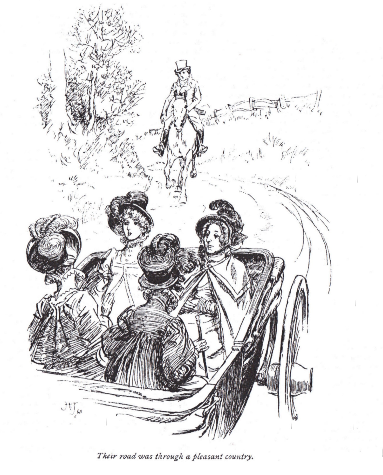 Mansfield Park, ch 8 : Fanny apprécie la sortie en calèche avec Maria, Mary et la tante Norris qui la conduit à Sotherton, surtout qu'Edward les suit à cheval.